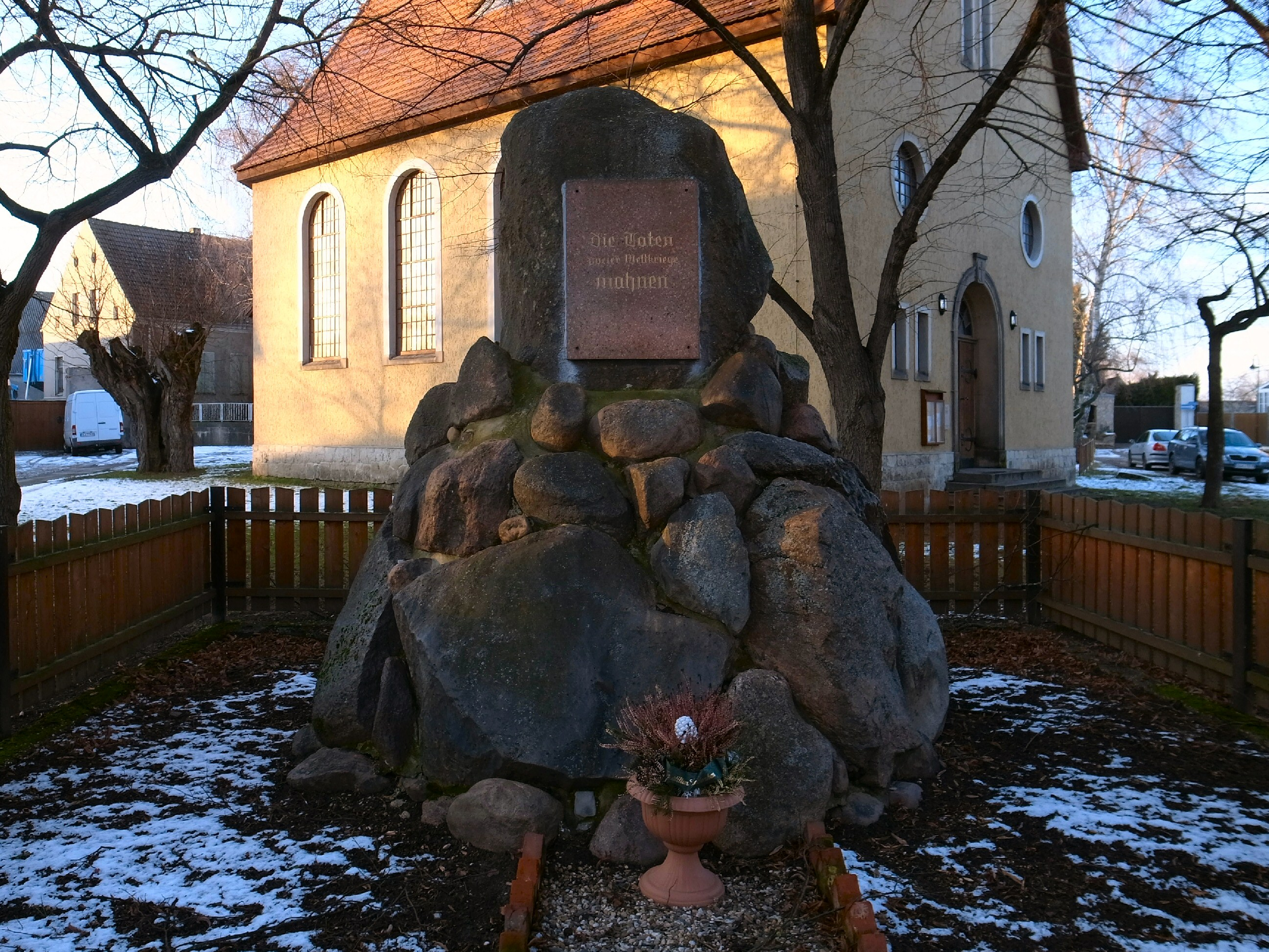 Schwarz (Calbe), Denkmal für die Gefallenen der Weltkriege.